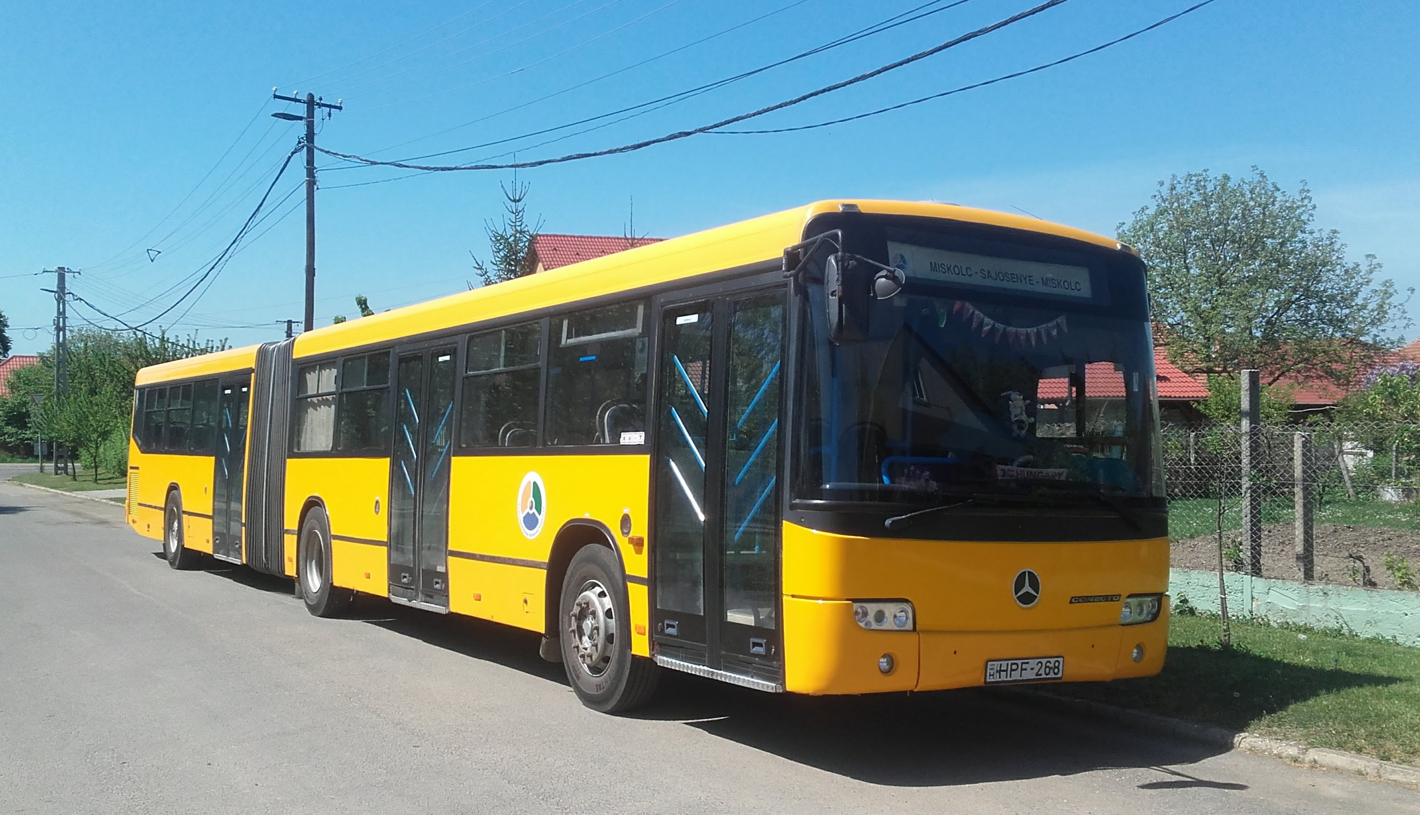 Az ÉMKK HPF-268 rendszámú Mercedes Conecto busza Sajóvámoson, a 3705-ös helyközi járaton.